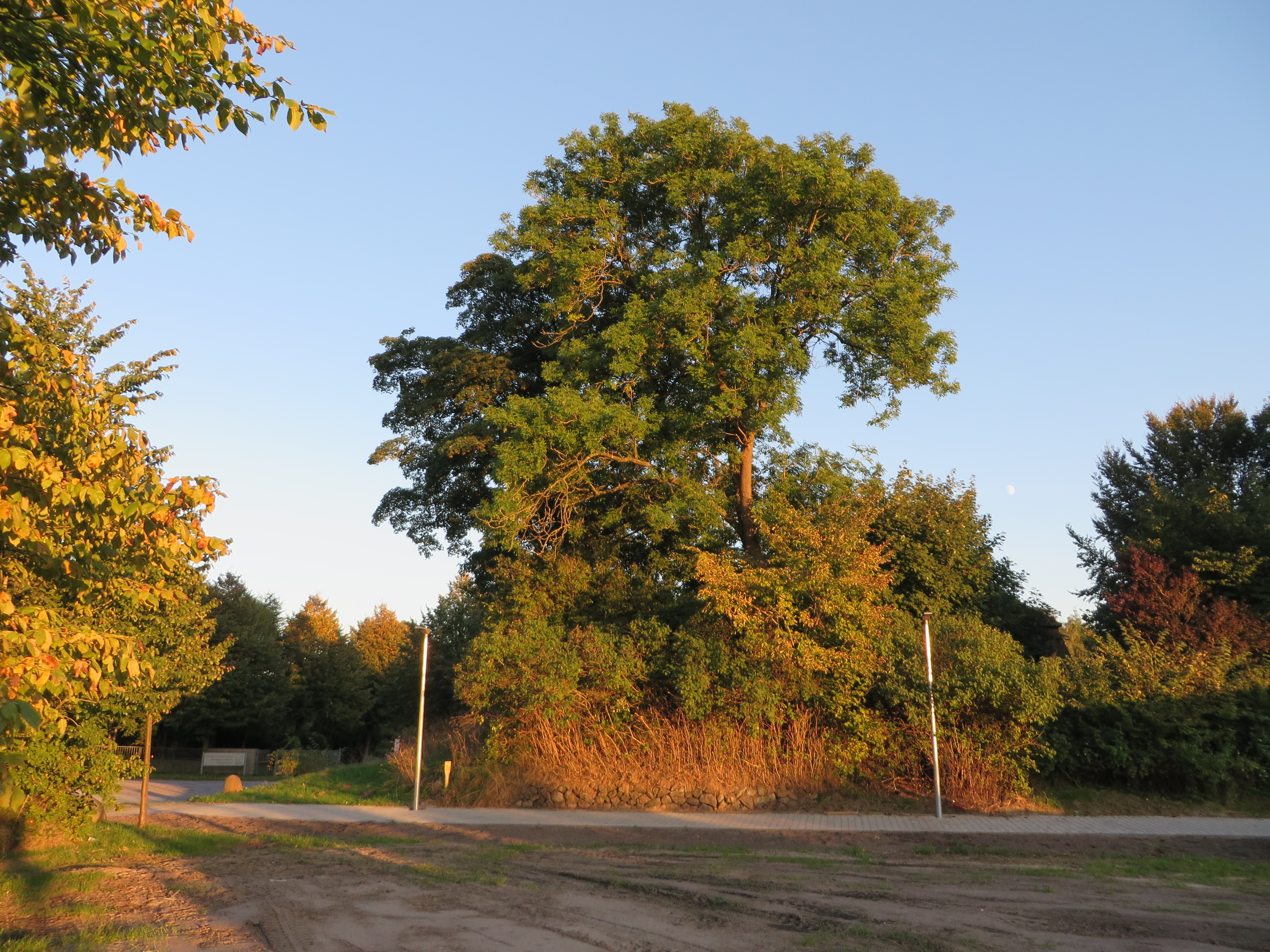 Friedenshügel, Flensburg 4 September 2014, Querformat, Bild 01